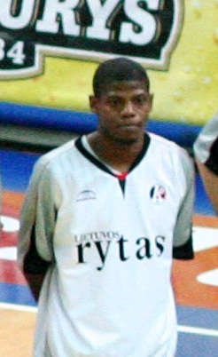 Hollis Price in BC Lietuvos Rytas, 2007.